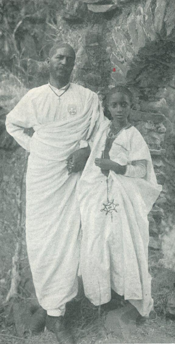 Kantiba Gebru und Tochter, Dolmetscher der Rosengesandtschaft